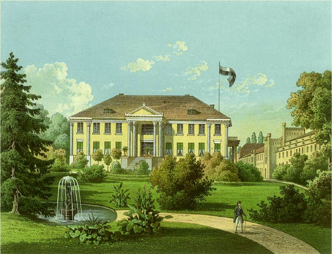 Gut Hanseberg